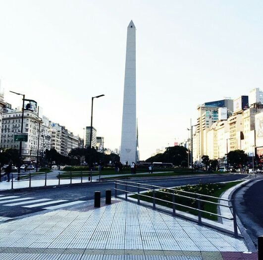 Obelisco de la Ciudad Autónoma de Buenos Aires.